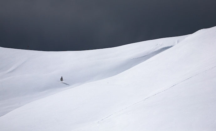 Velika planina, ki kraljuje nad Kamnikom, je največja morda pa tudi najlepša planina v Sloveniji. Več o planini lahko izveste v knjigi Velika planina (zemljevid in fotografije)